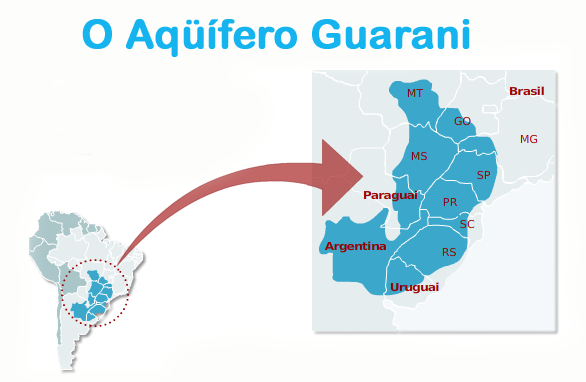 Ubicación del Acuífero Guaraní en el mapa de Suramérica.